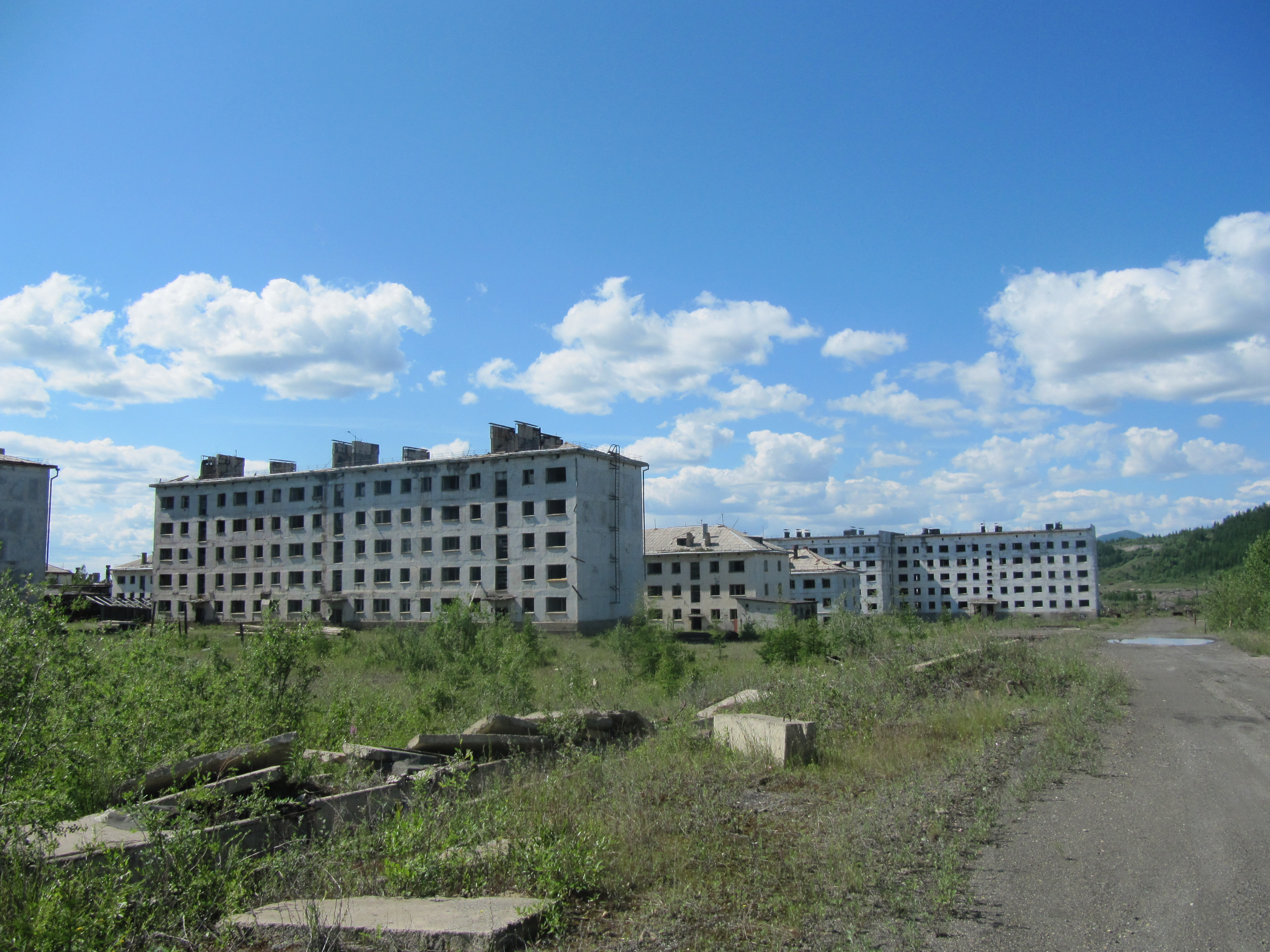 Kadykchan